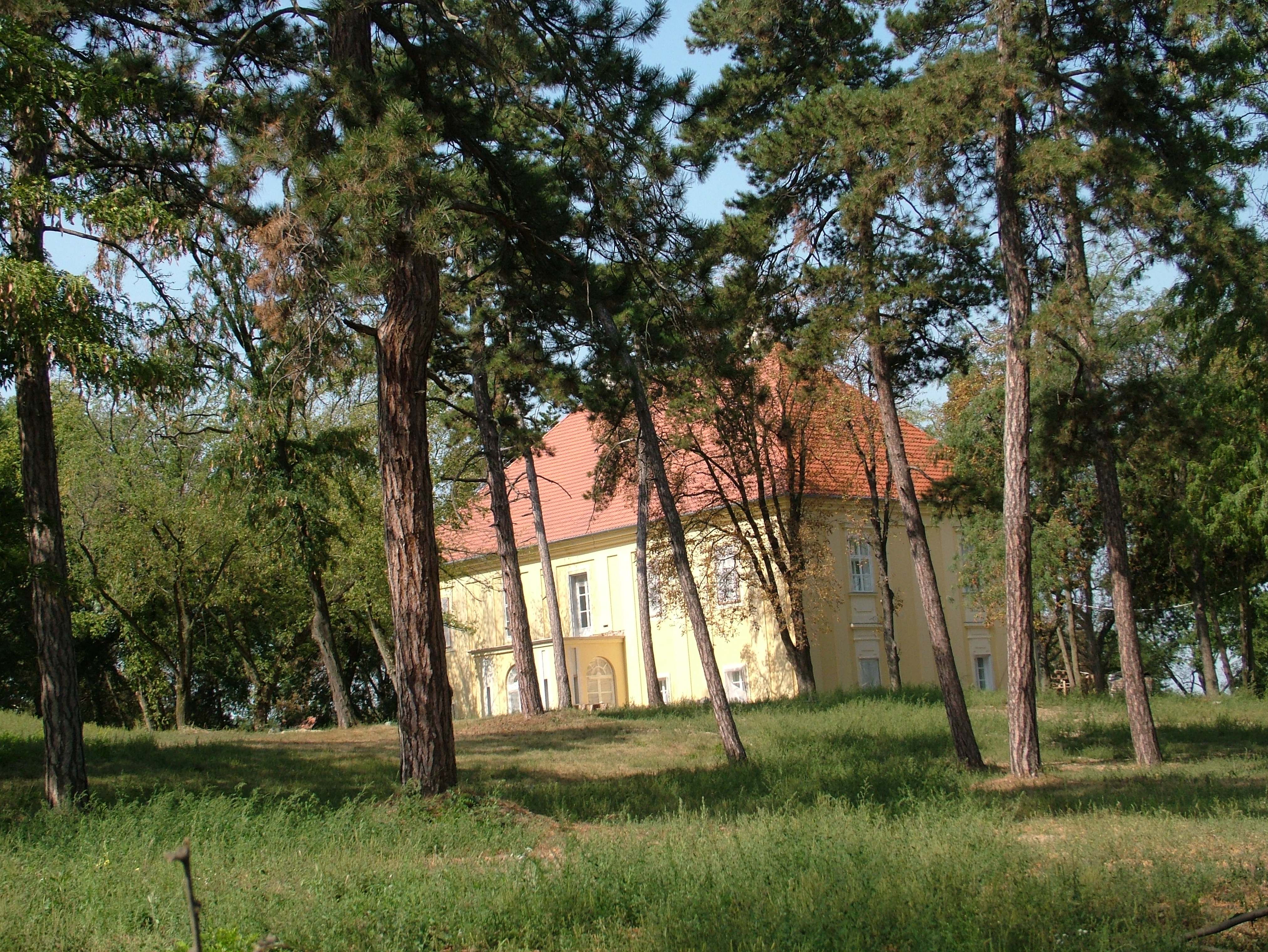 Kőröshegy Széchényi Mansion